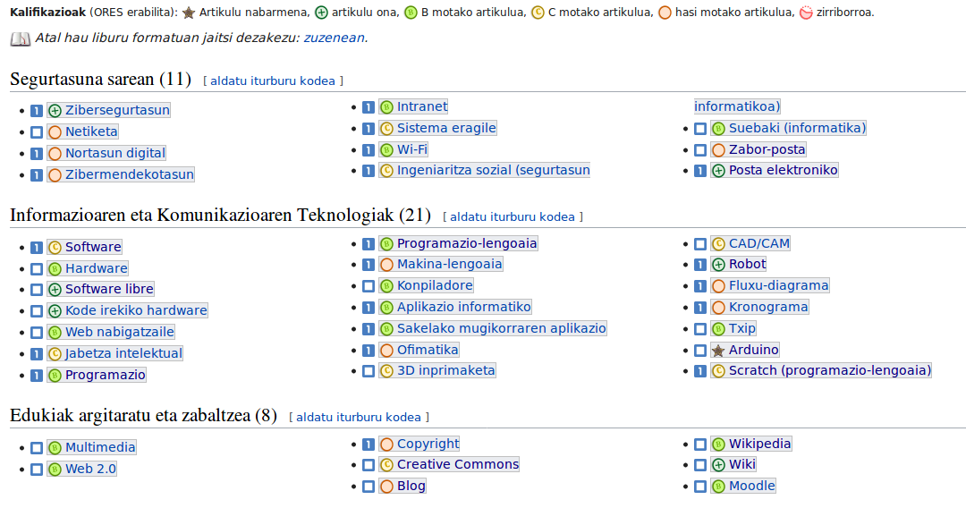 Artikulu-kalifikatze automatikoa. Euskal Wikipediako Hezkuntza proiektuan Informatika arloko artikuluen ikuspegi orokorrean artikulu bakoitzeanikus daiteke bere kalitatearen neurketa.